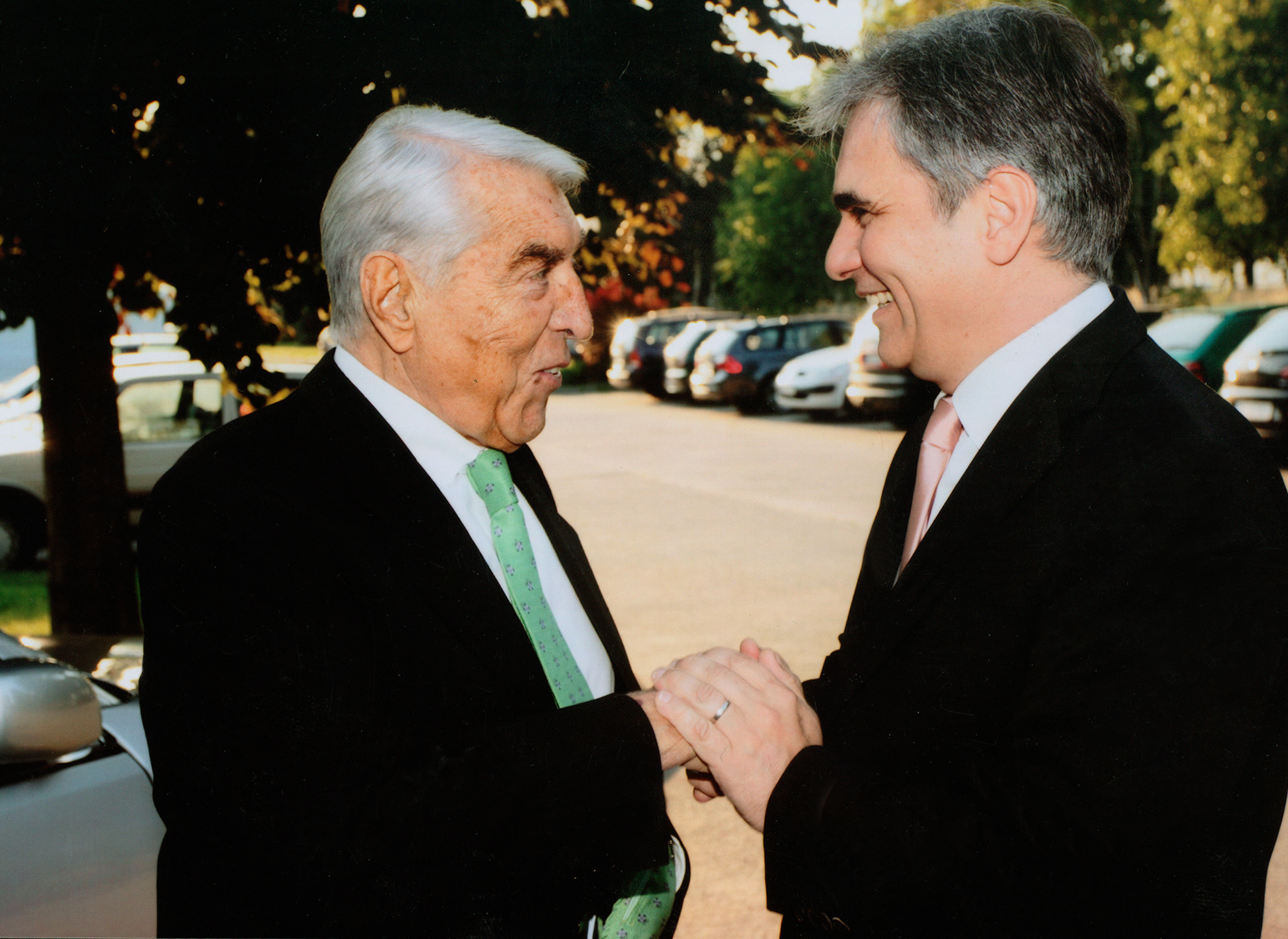 Werner Faymann spricht mit Helmut Zilk. Foto: privat